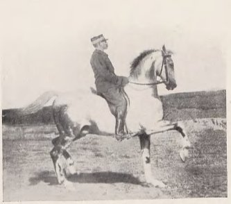 L'écuyer français du Cadre noir Etienne Beudant et son cheval Barbe Mabrouk au piaffer brillant.